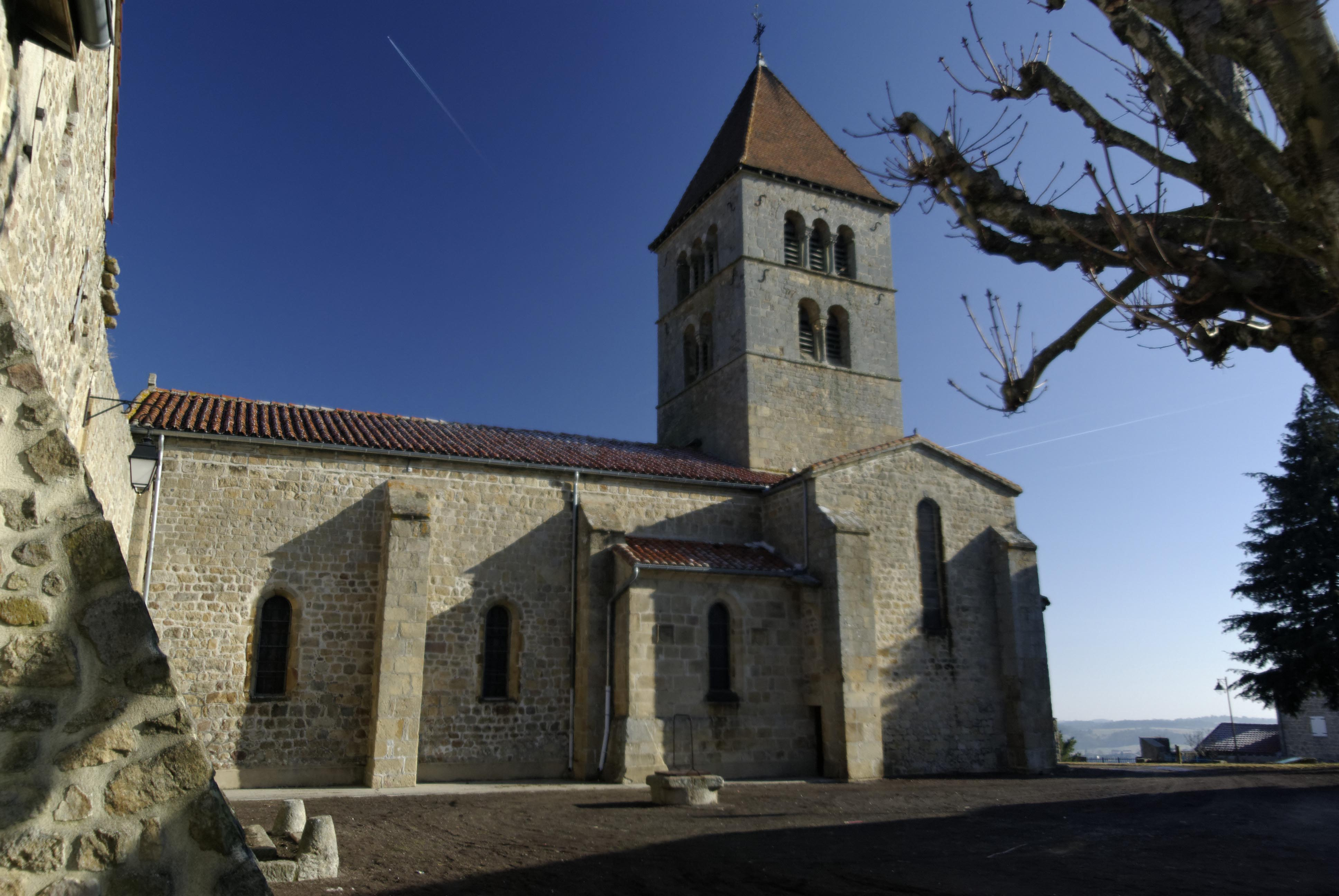 Église Saint-Blaise de Rozier-Côtes-d'Aurec, (Classé, 1924) .